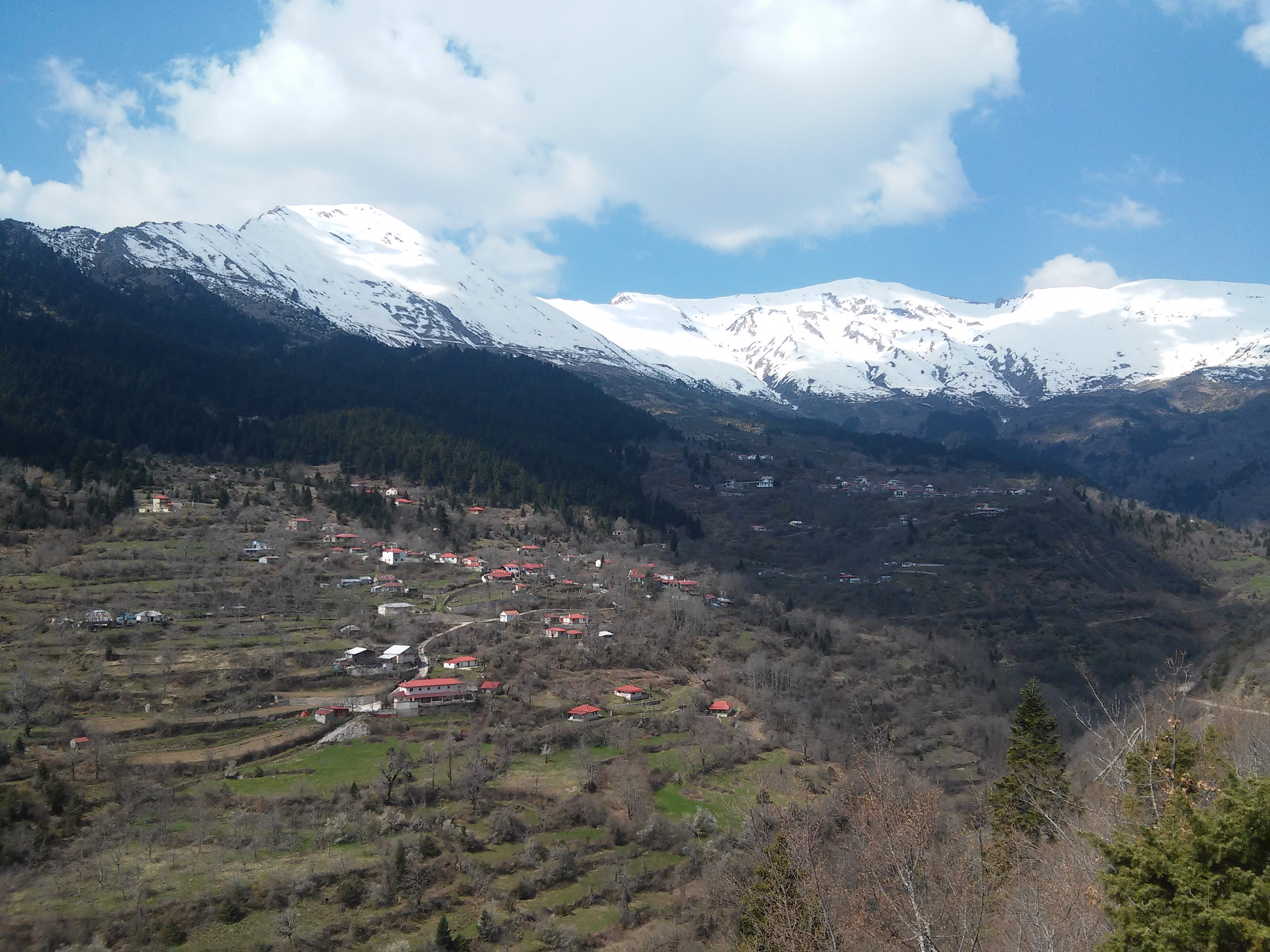 Άποψη του χωριού